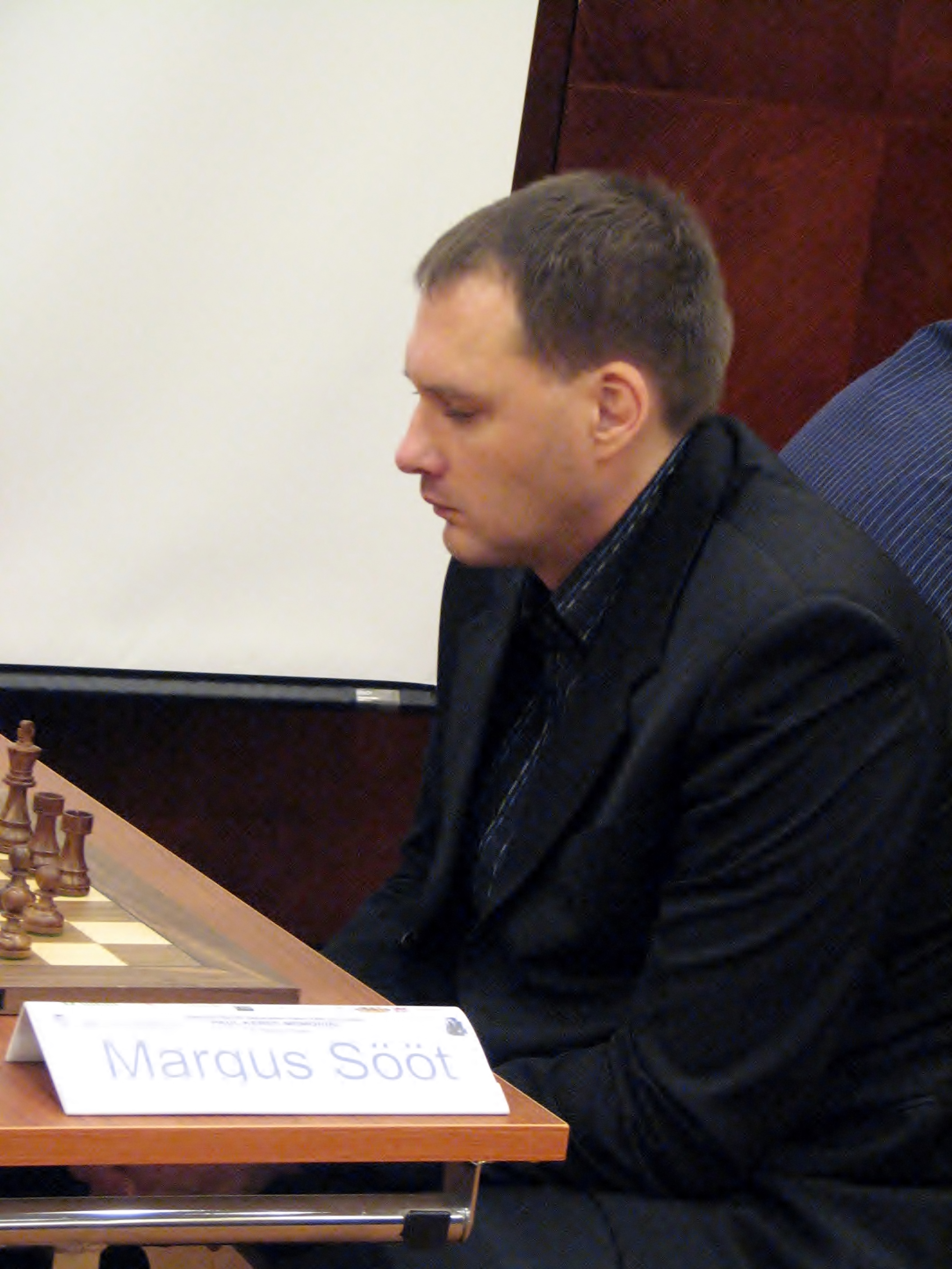 Margus Sööt Paul Kerese mälestusturniiril